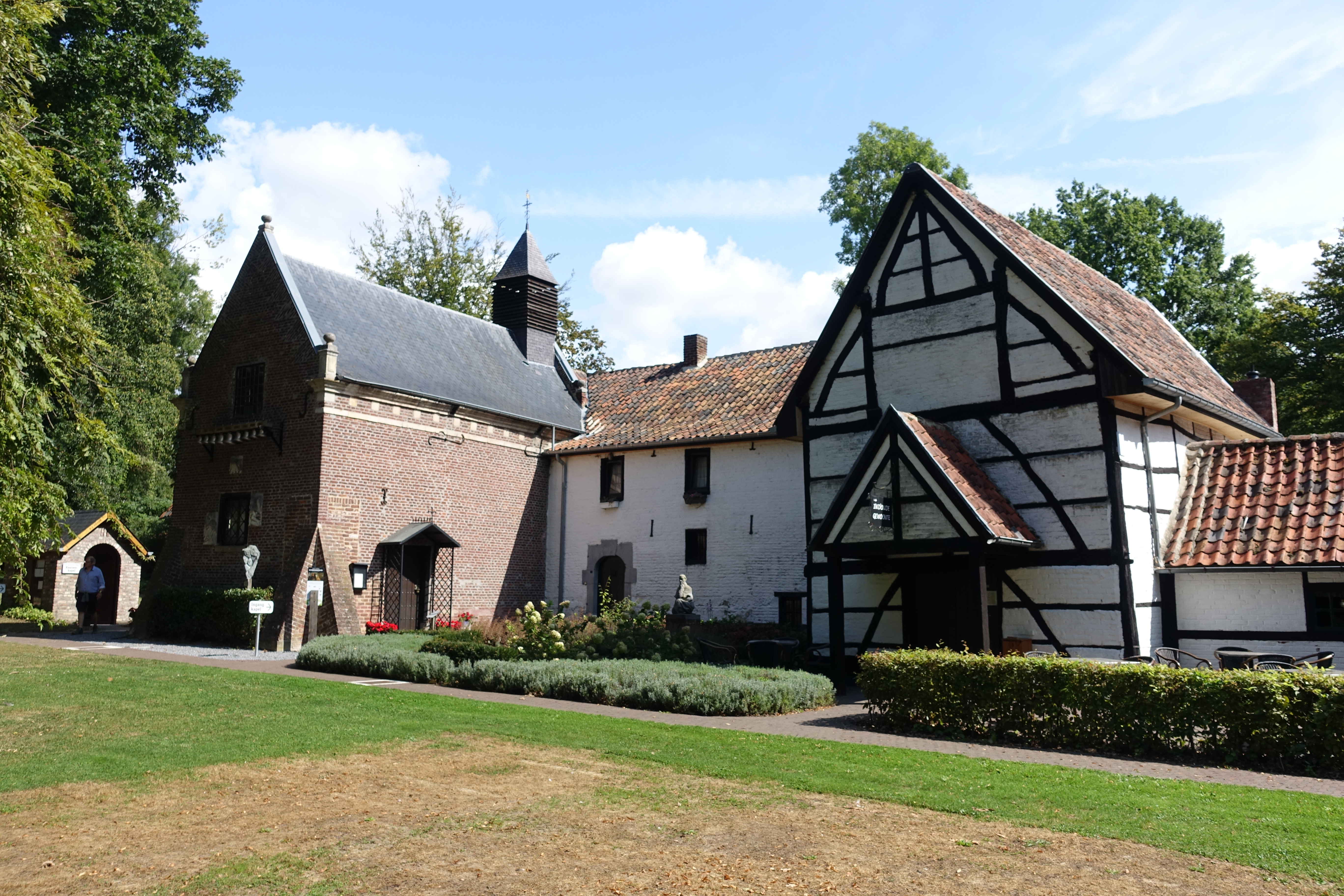 Kluis van Vrijhern is een kluizenarij en bedevaartsoord in de plaats Vrijhern in Hoeselt.